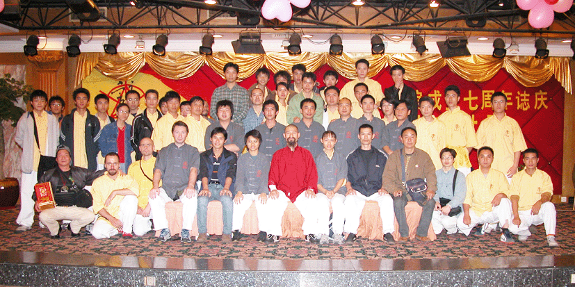 Oslava školy Mai Gei Wong Wing Chun v Guangzhou, 2005. Uprostřed současný vedoucí školy, mistr Wong Nim Yi. Použito s výslovným svolením majitele, I.Rzounka.